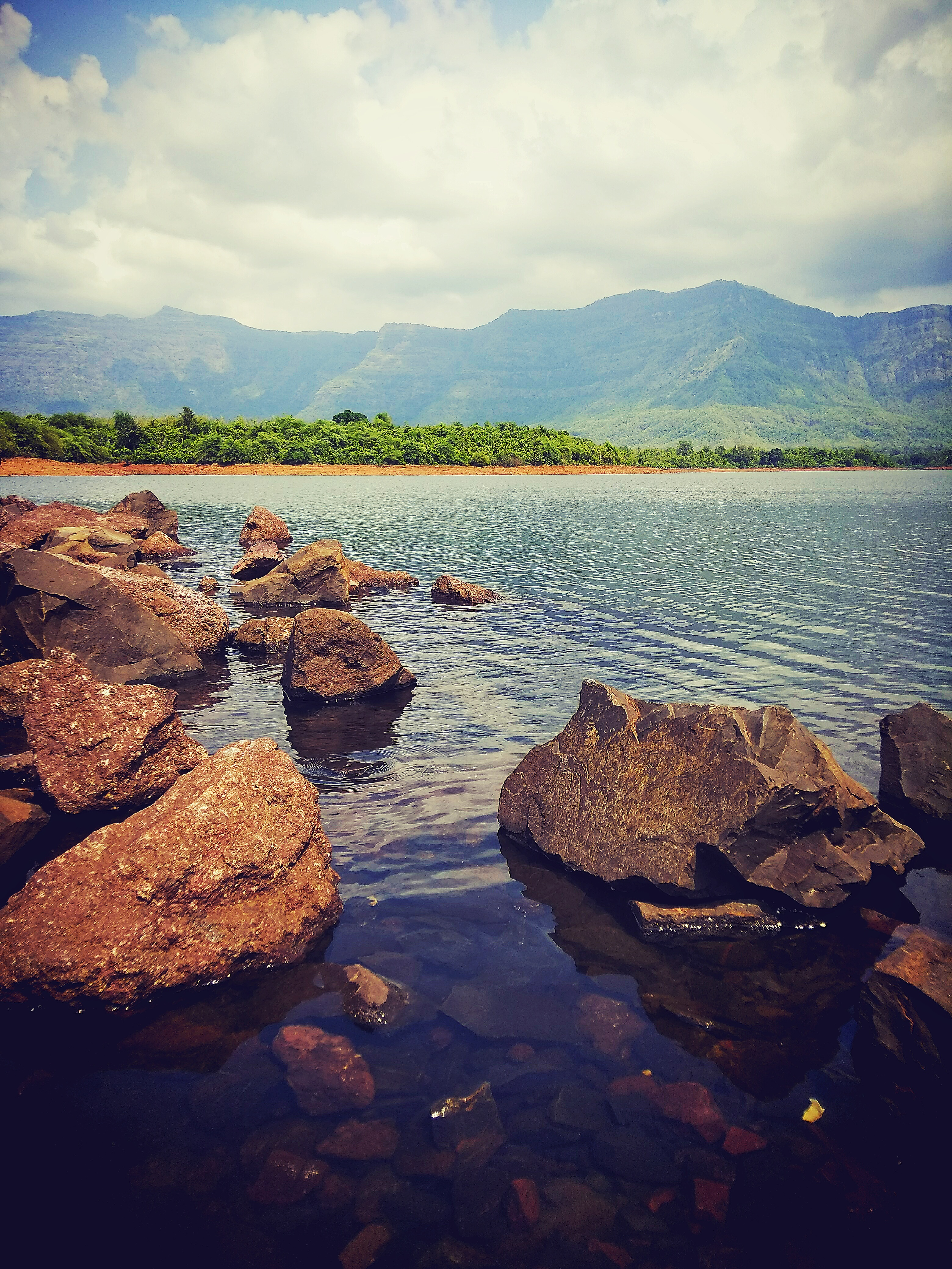 padale dam thane Murbad 421401 Maharashtra India